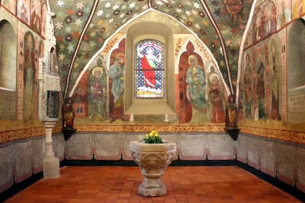 Barbarakapelle in der Thierfelder Kirche